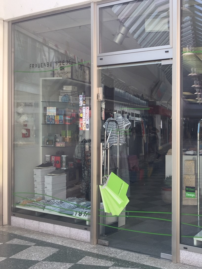 Laden der Frauenbetriebe in Frankfurt, Leipziger Strasse 5